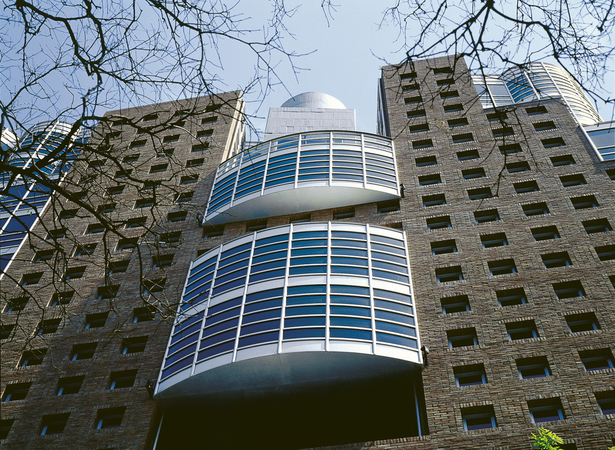 Córdoba Office Center. Av. Figueroa Alcorta 185, Córdoba, Argentina.